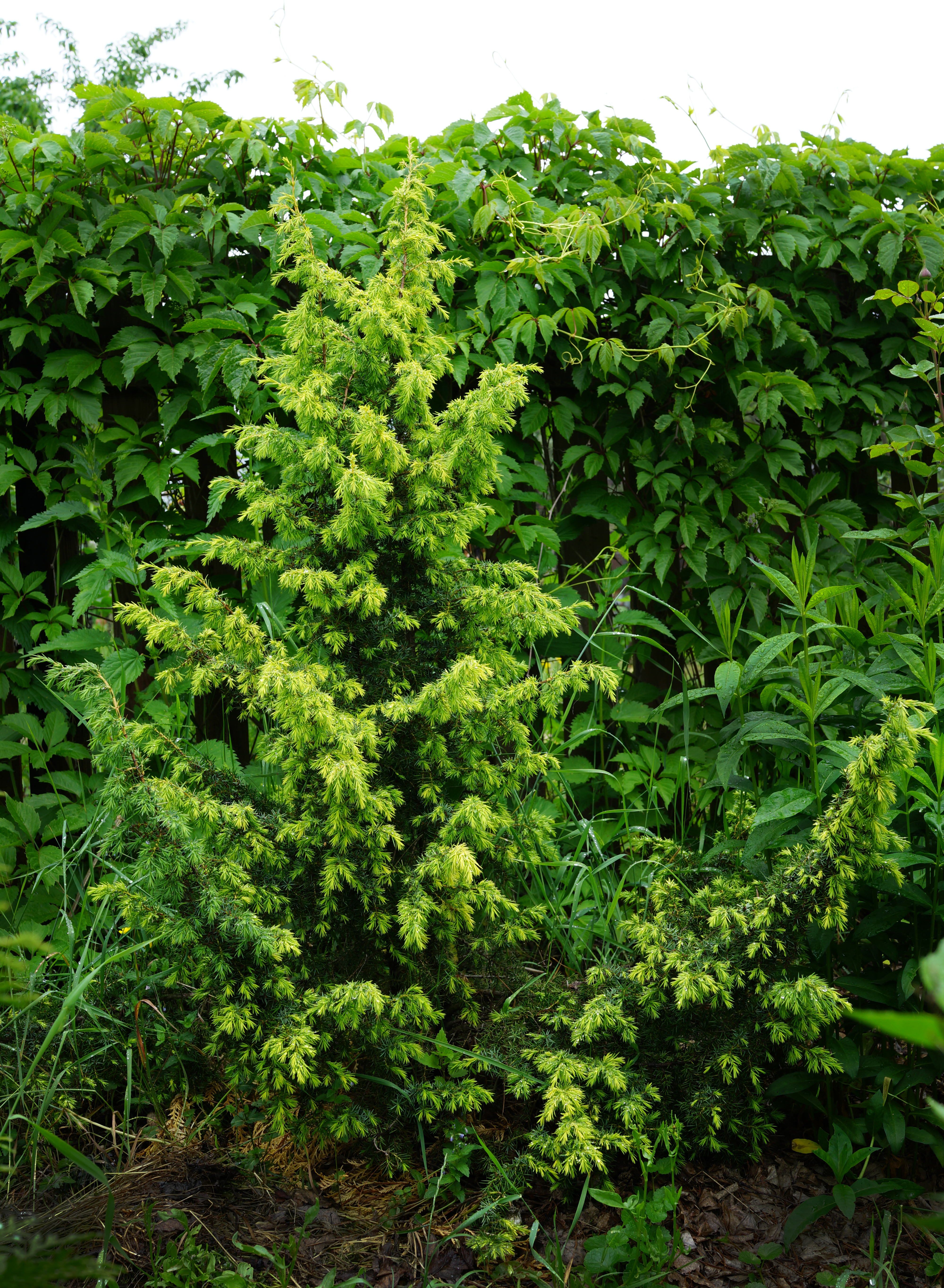 Россия, Владимирская область, Петушинский район, частный сад